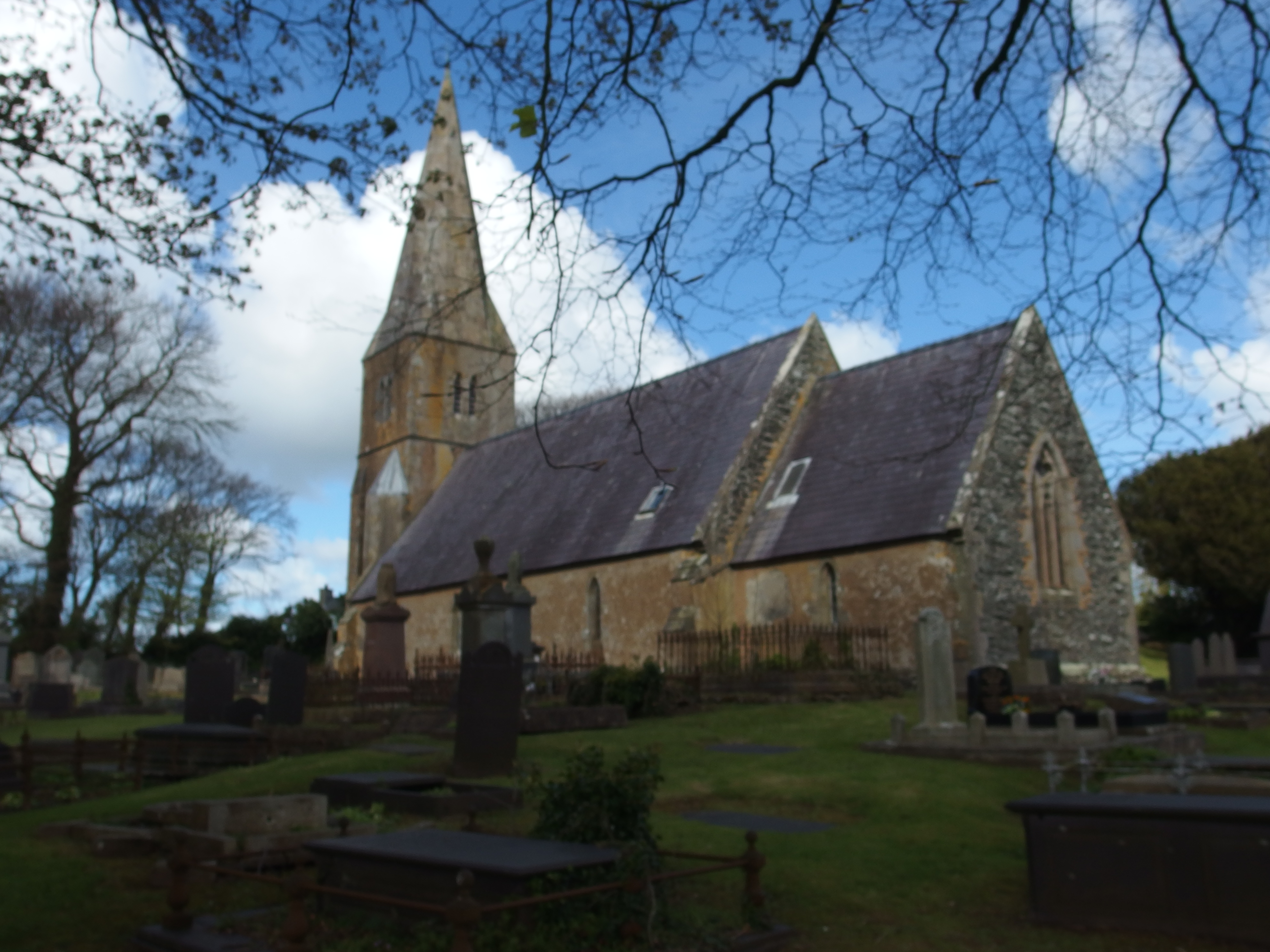 Eglwys Llangaffo